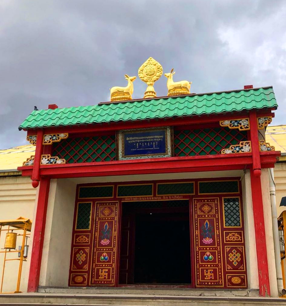 The main entrance to one of the temples of the monastery